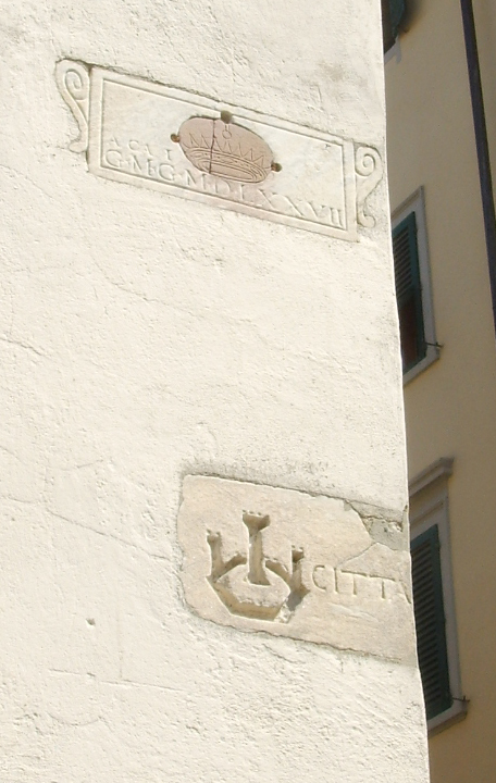 Sant'ambrogio, targhe gran monarca e città rossa